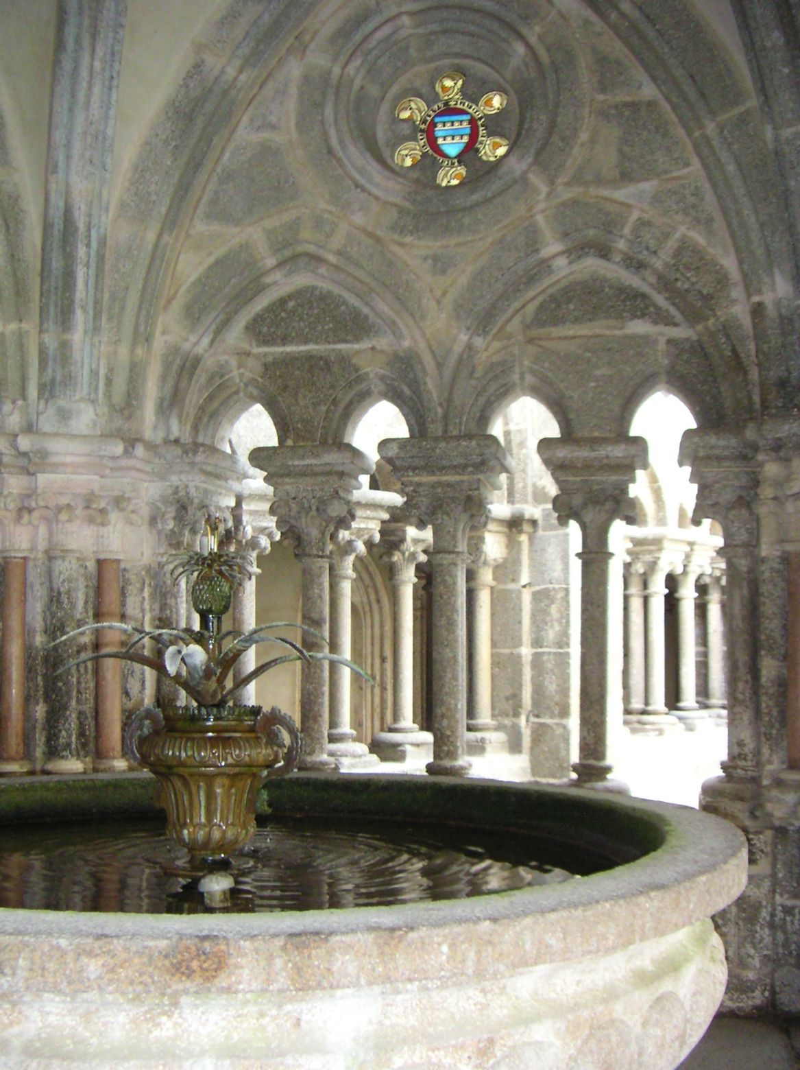 Kreuzgang im Stift Zwettl